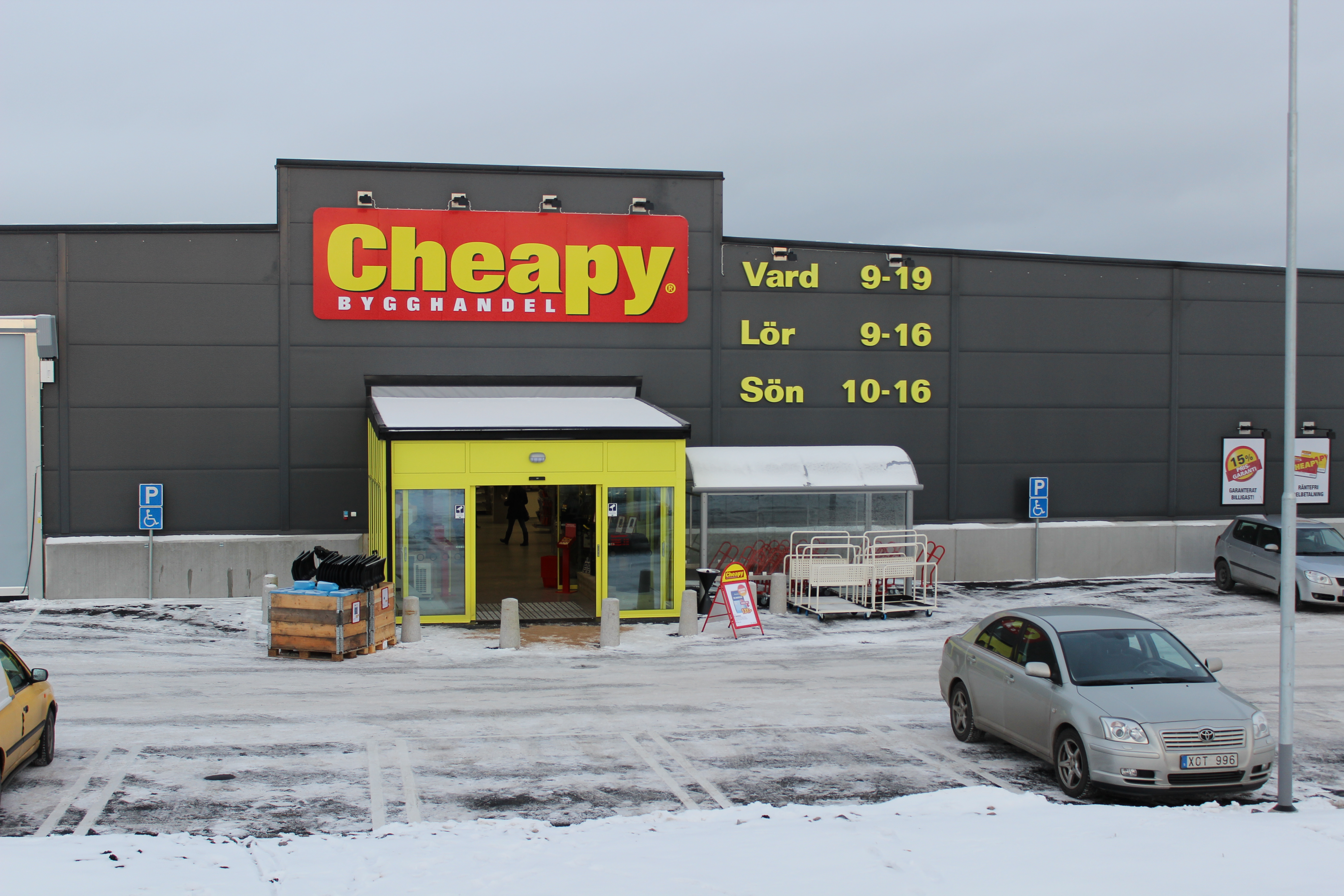 Cheapy erbjuder ett välanpassat sortiment av kvalitetsbyggvaror till låga priser och hög tillgänglighet och riktar sig mot Gör-Det-Självare som uppskattar välkända produkter av hög kvalitet till lågt pris. Cheapy ingår i Wolseley, Nordens största distributör av byggmaterial.